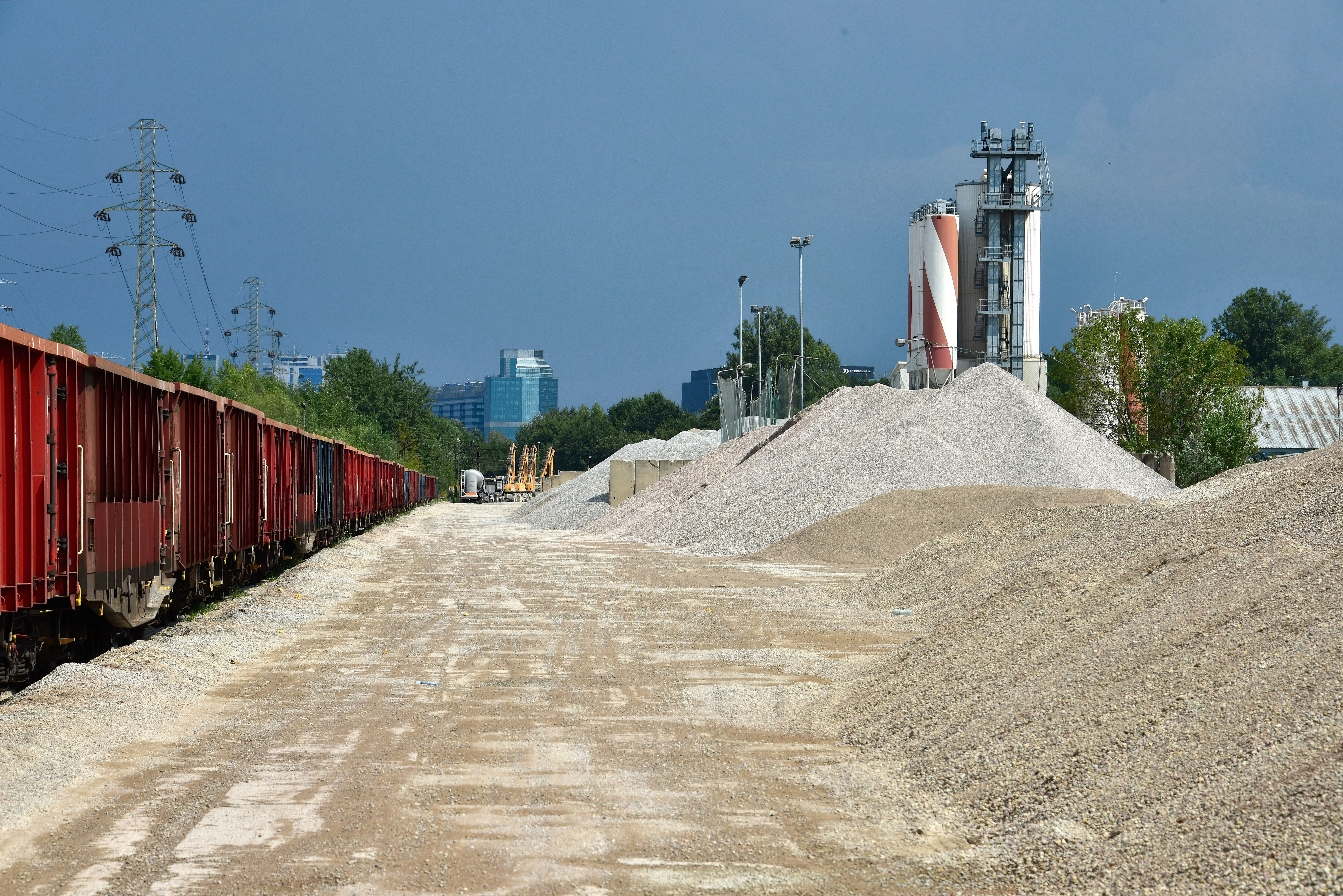 Odolany w Warszawie. Rozładunek kruszywa na bocznicy kolejowej przy ul. Gniewkowskiej